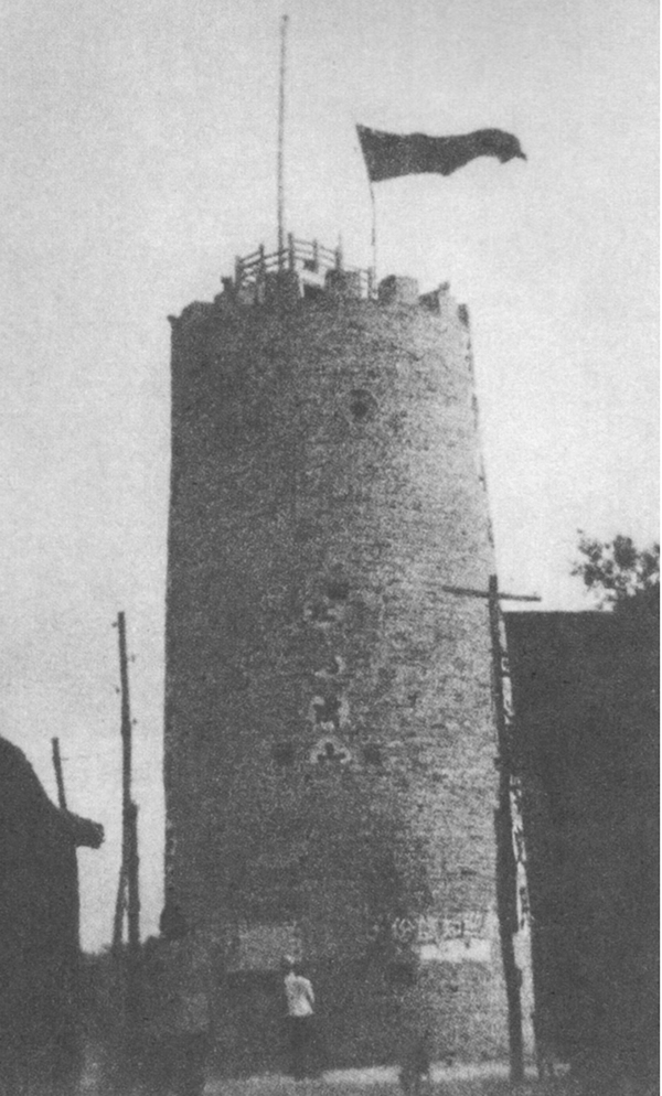 晋冀鲁豫部队向平汉路中段、陇海路中段、同蒲路南段进军，解放了邯郸等许多城市和铁路沿线两侧的广大地区。图为一九四五年八月十日八路军解放封丘城